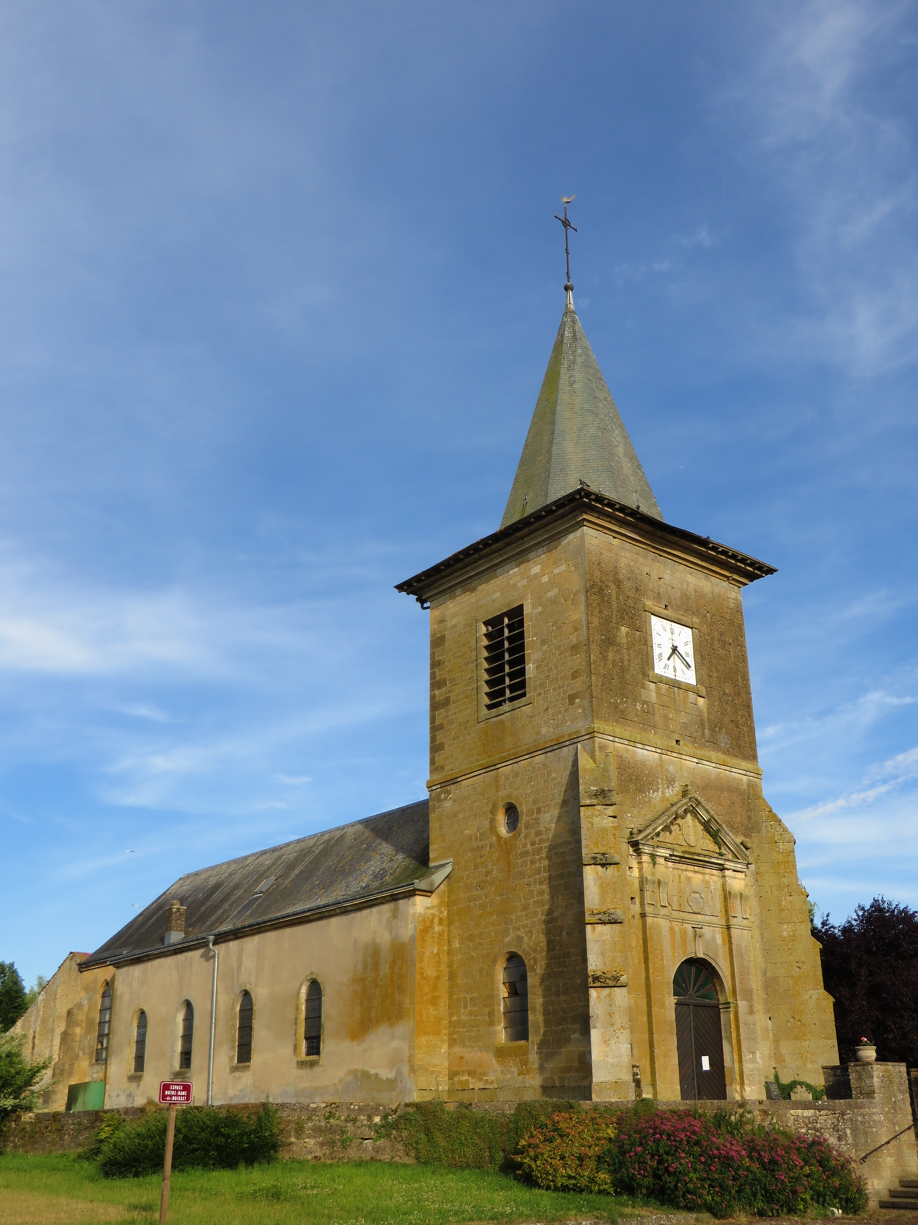 Nepvant L'église Saint-Maximin